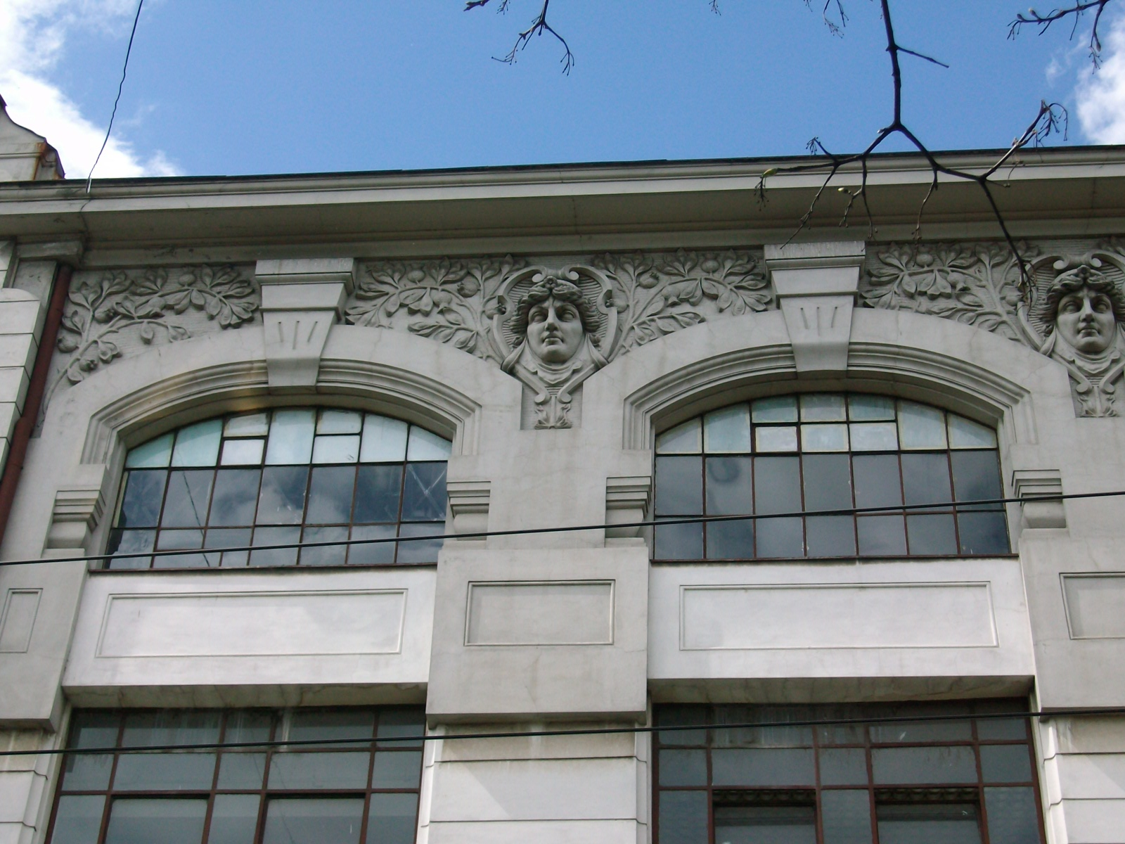 Детаљ на фасади зграде официрске задруге